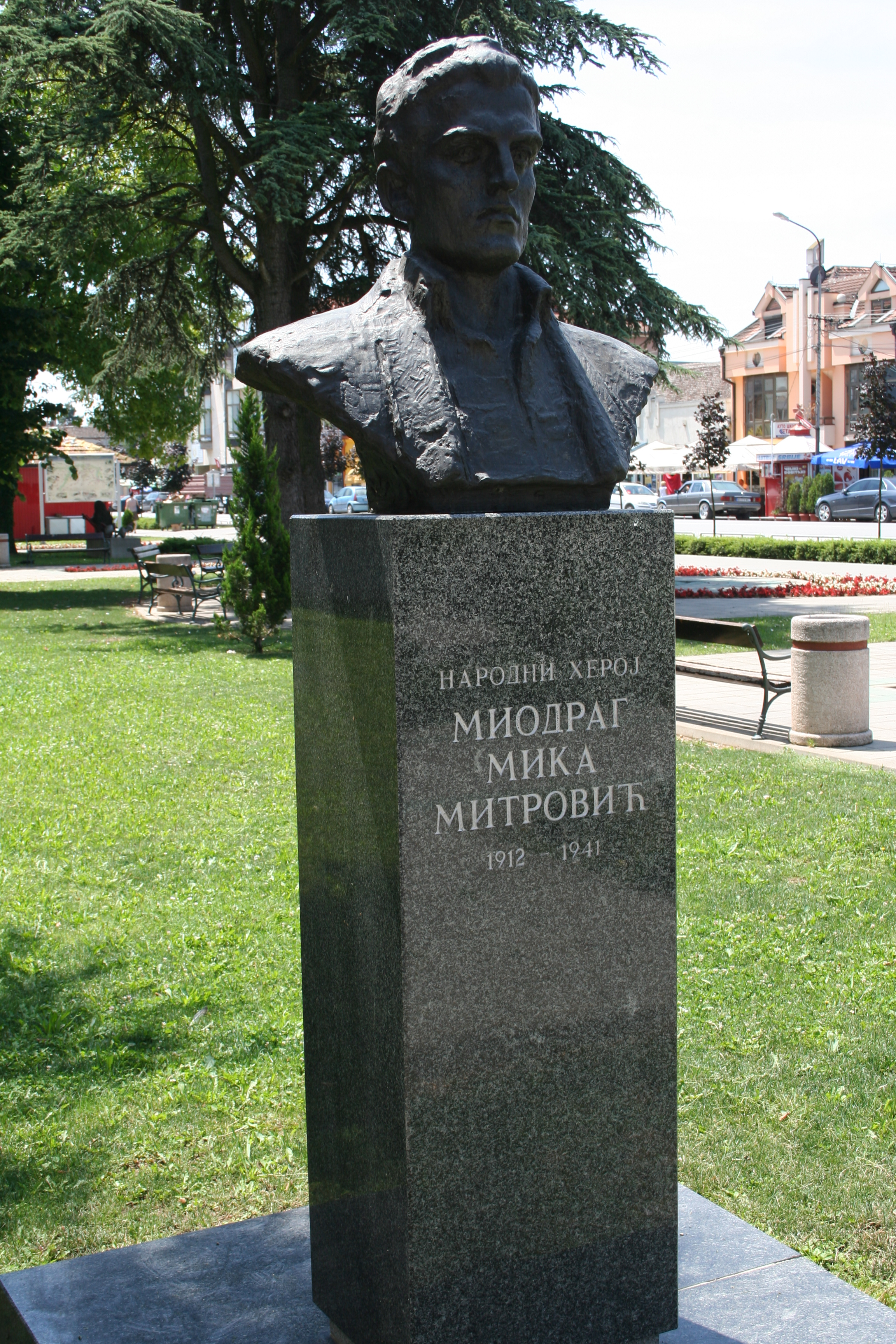 Spomenik Miki Mitroviću ispred osnovne škole, Bogatić